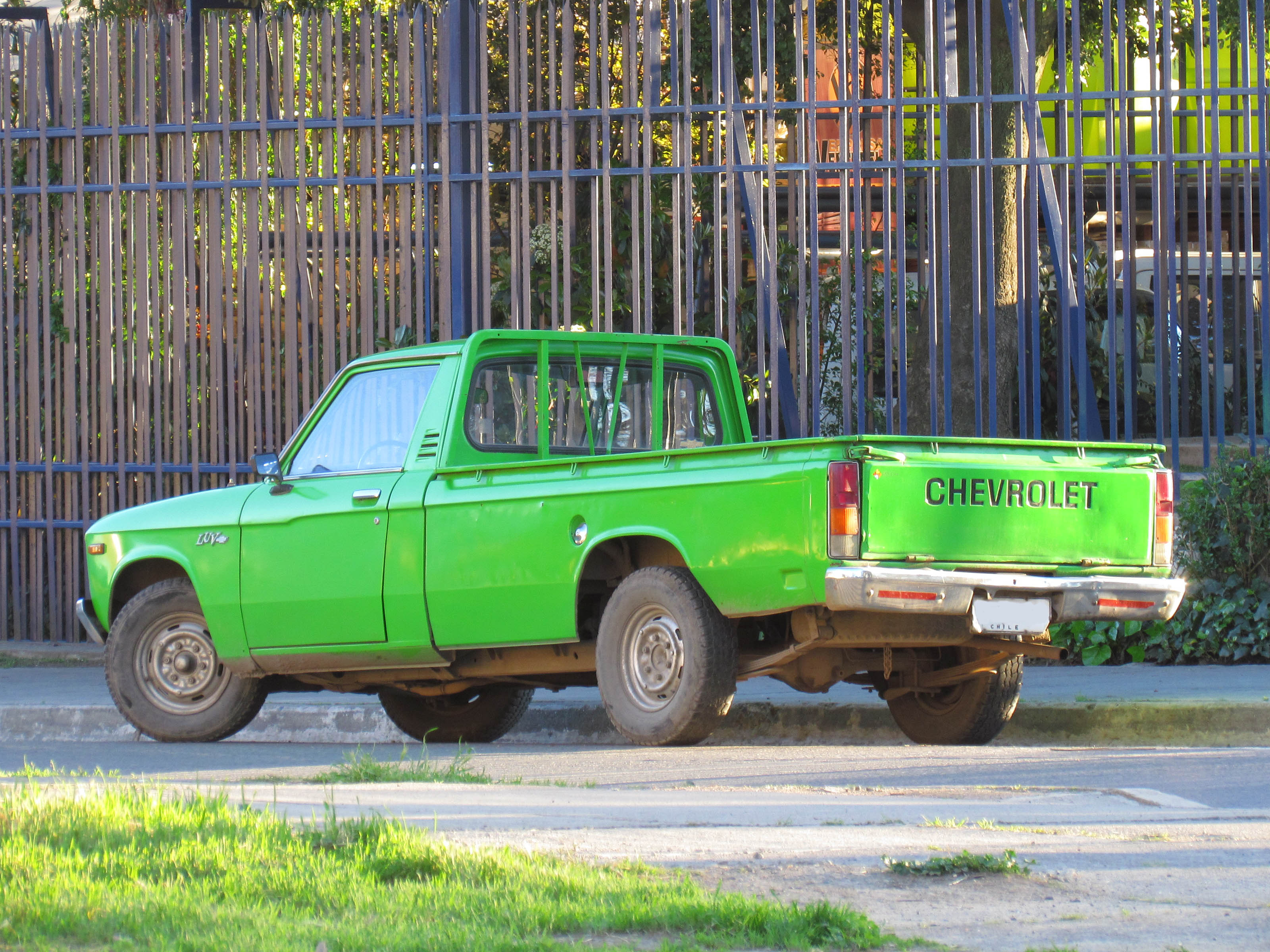 Chevrolet Luv 1600 1978